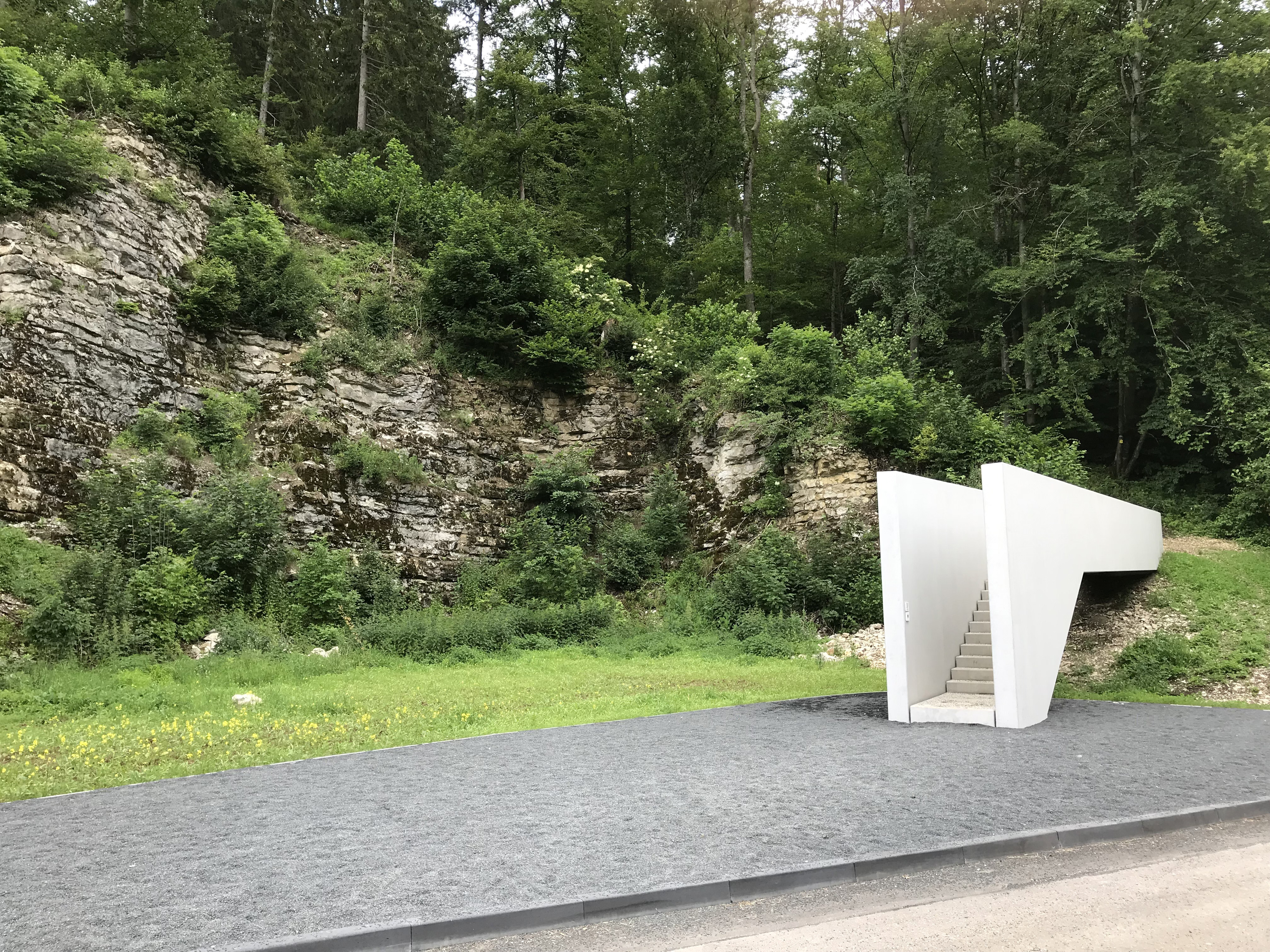 Essingen - "Markante Treppe" beim Remsursprung. Das Bauwerk entstand als Station 1 der "16 Stationen" der Remstalgartenschau 2019.